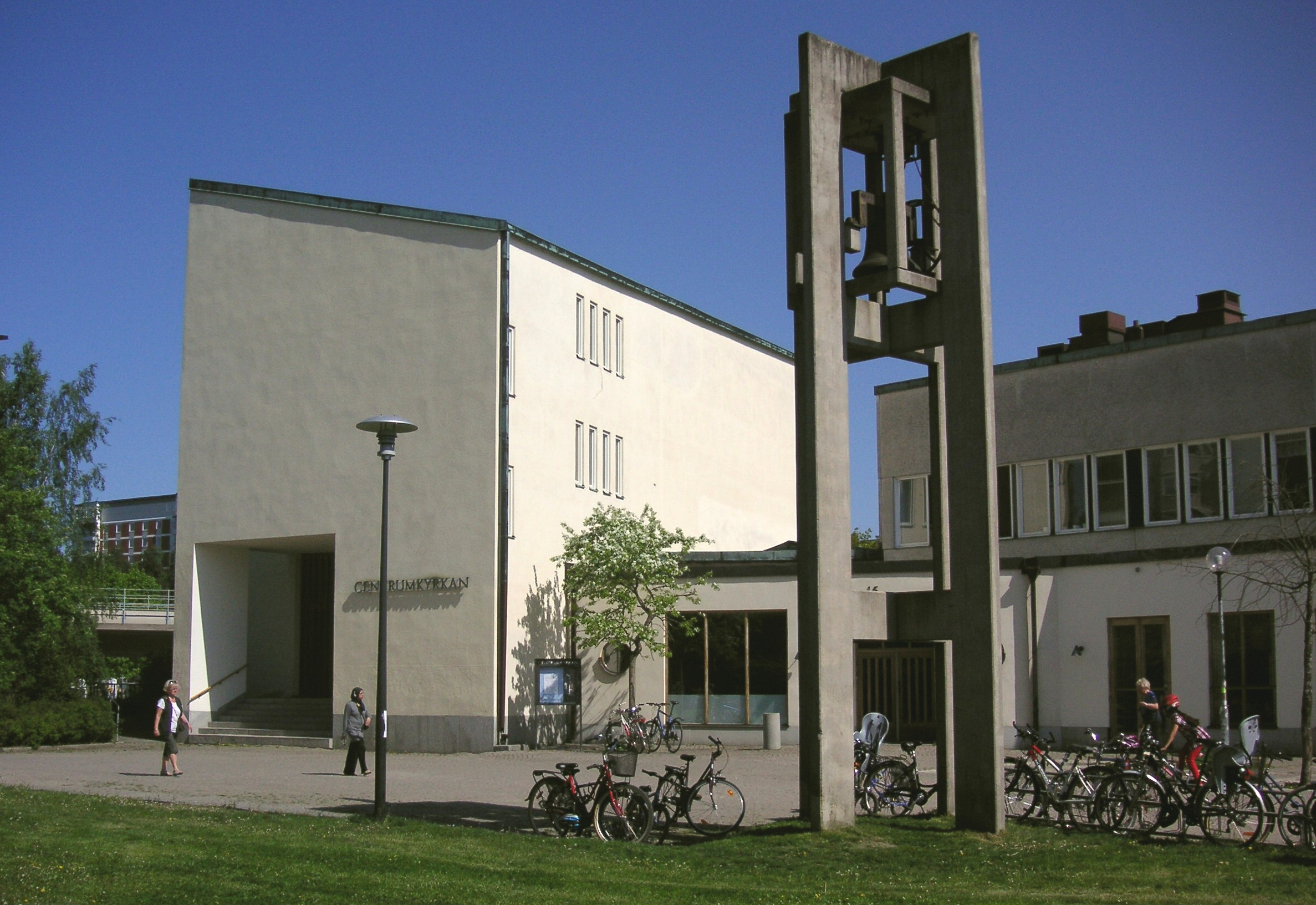 Centrumkyrka Farsta